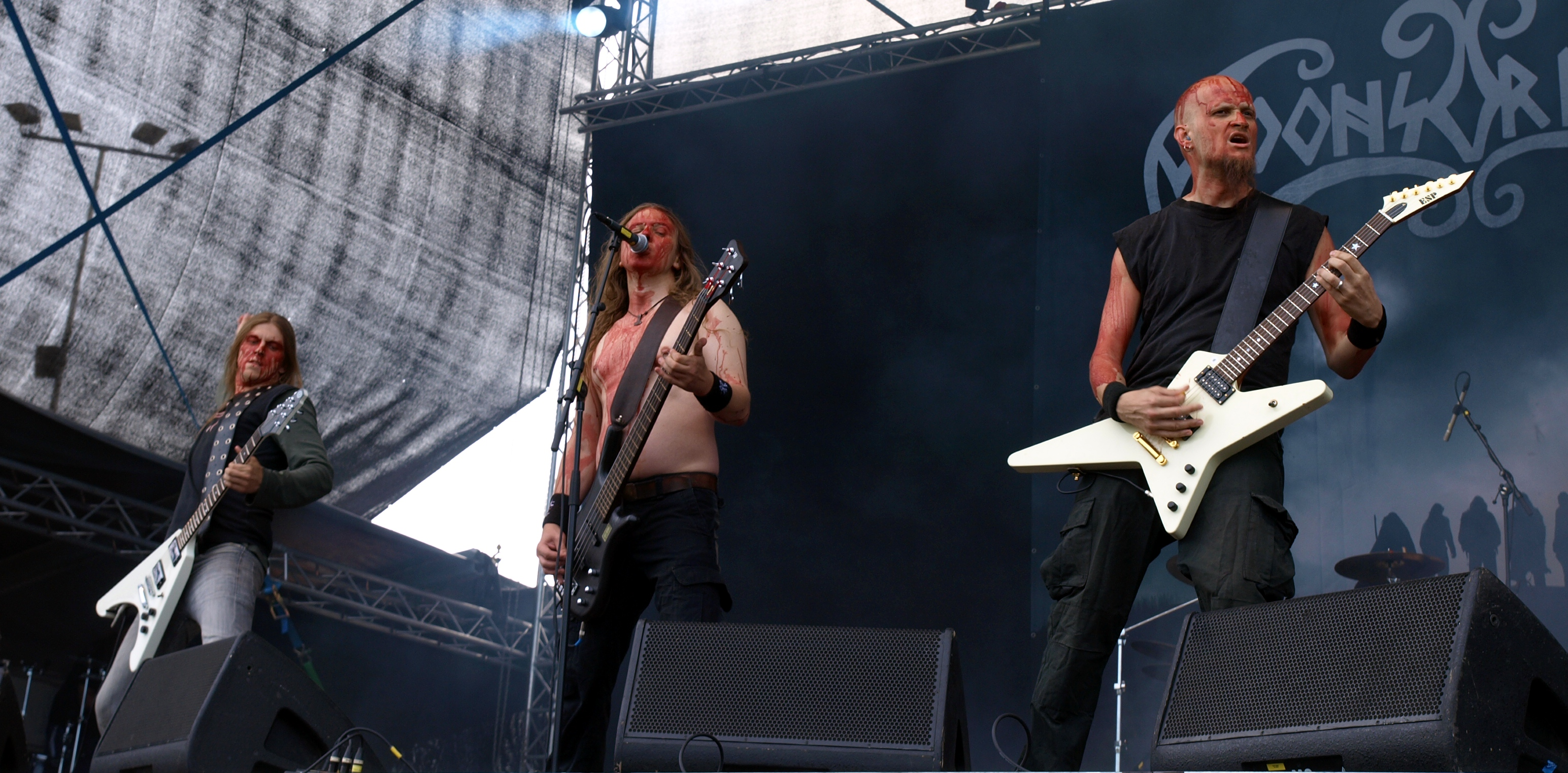 Moonsorrow live am Myötätuulirock 2011